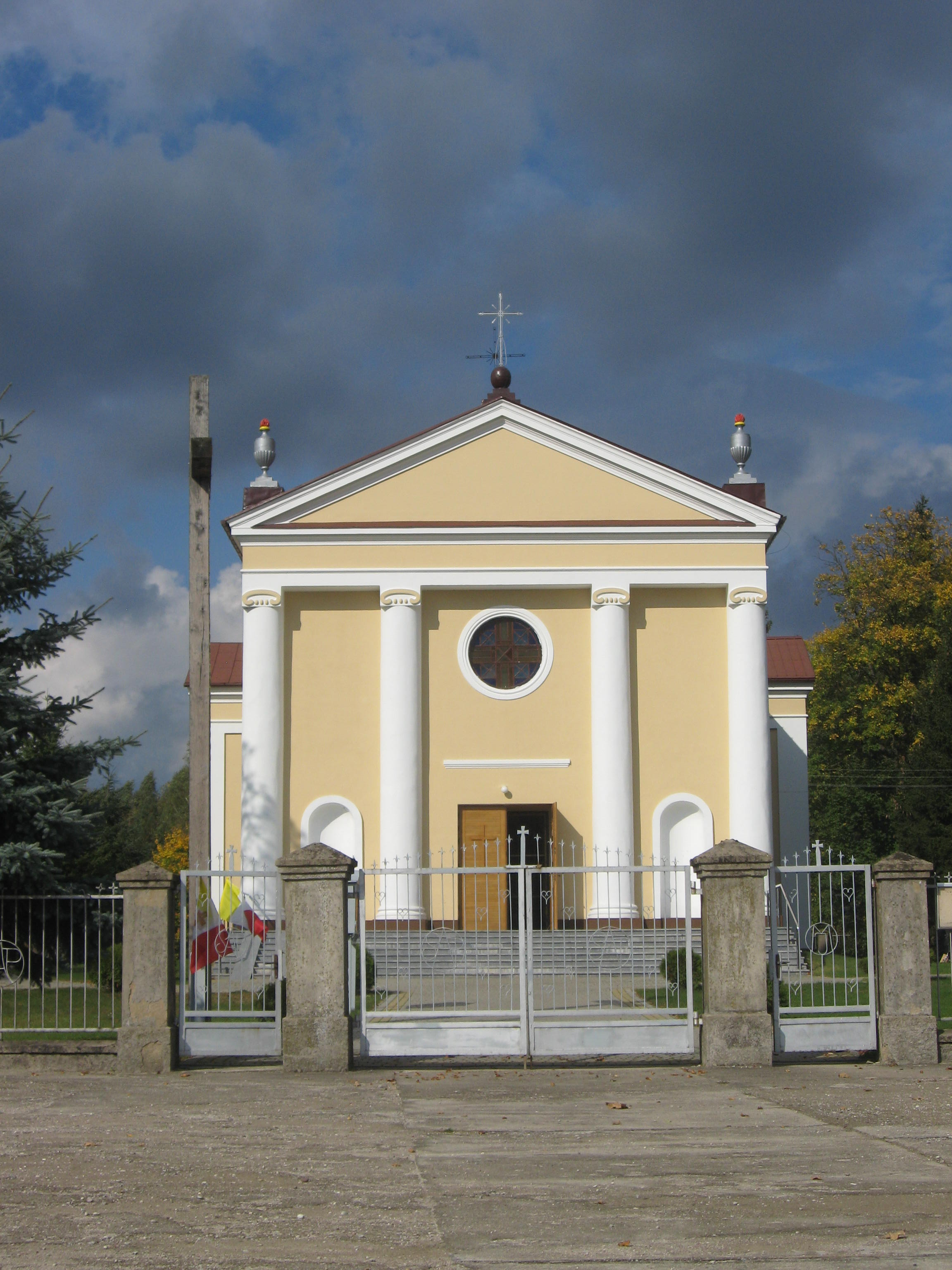 Ugoszcz 15 - rzymskokatolicki kościół parafialny pw. św. Antoniego Padewskiego, 1929-31